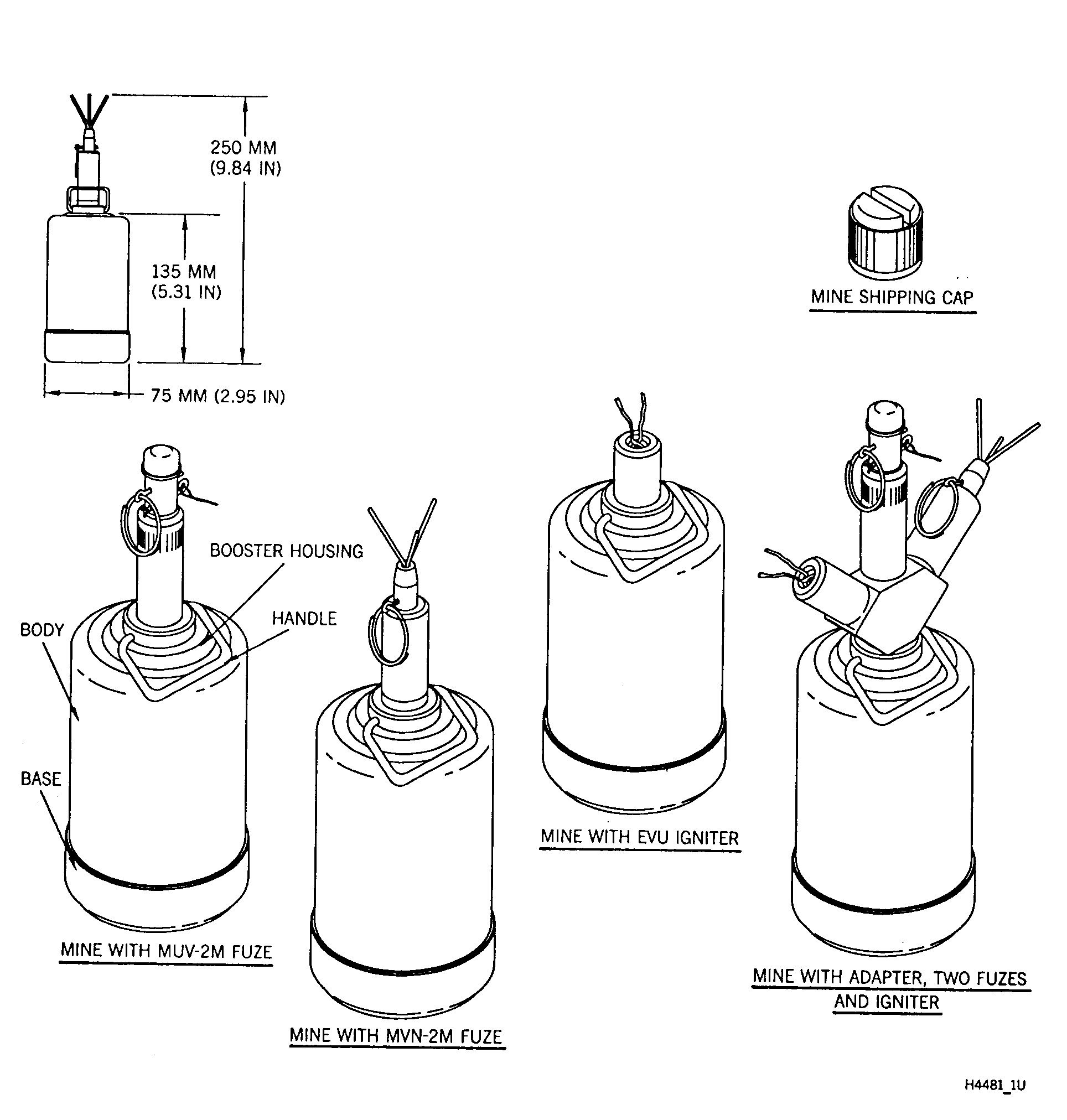 Bułgarska mina przeciwpiechotna PSM-1